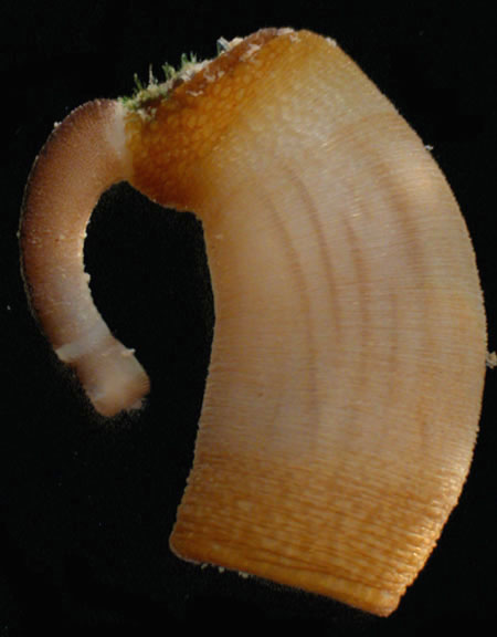 O animal presente na imagem é um sipunculídeo da família Aspidosiphonidae.